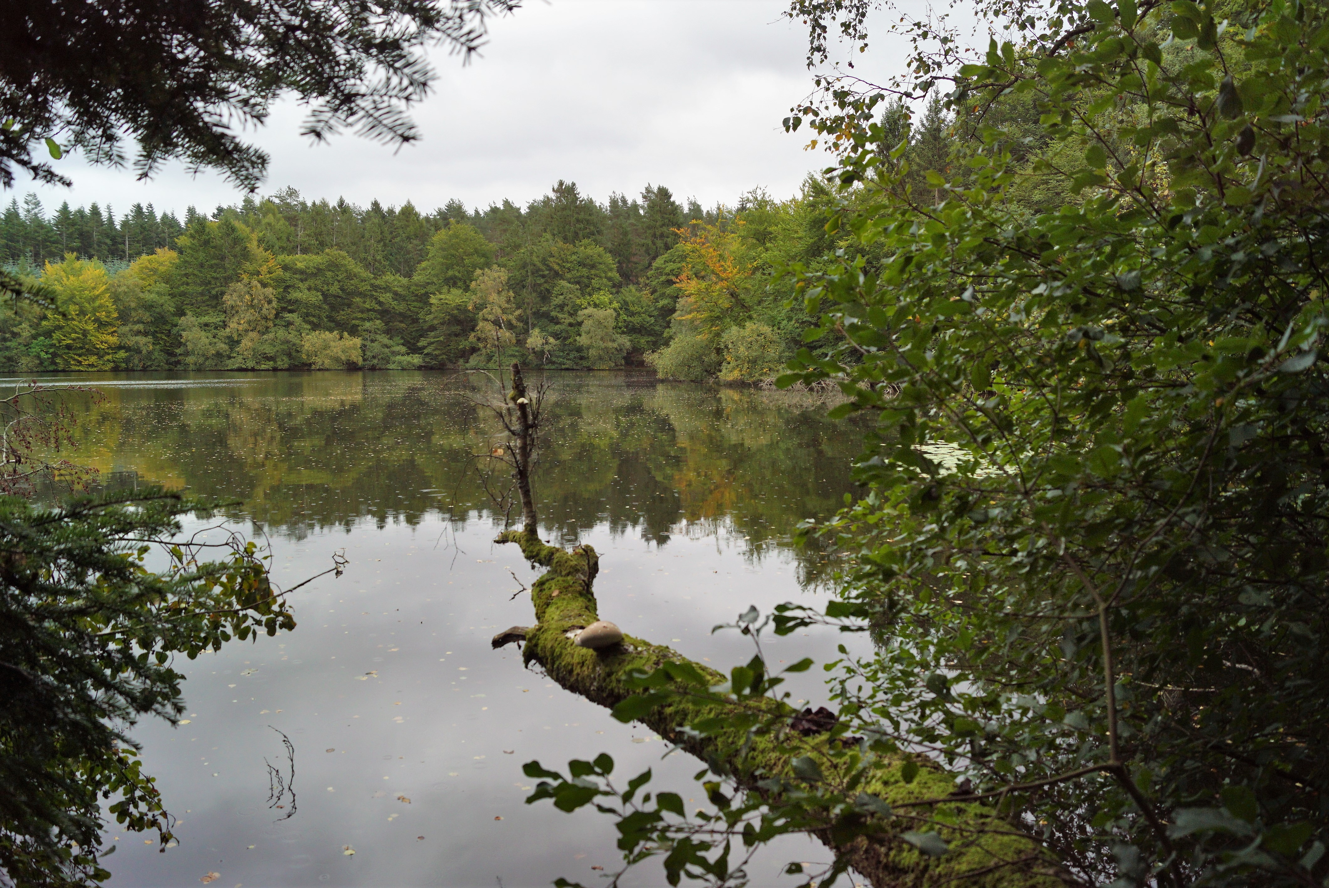 Avnsø set mod nordøst